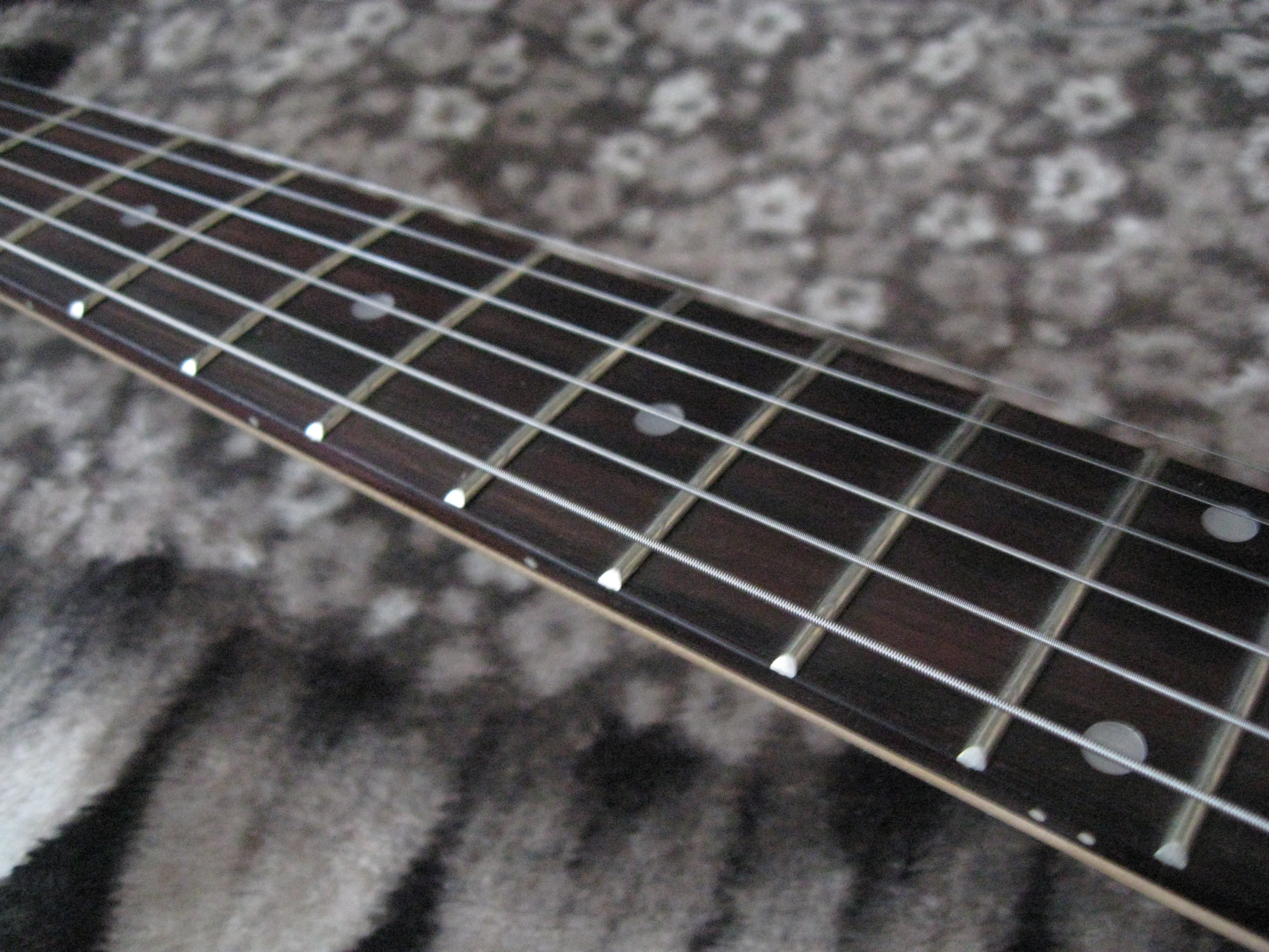 Фотографи гитарного грифа (электрогитары Washburn VG-580) на которой видны обозначения ладов спереди, и на ребре грифа.